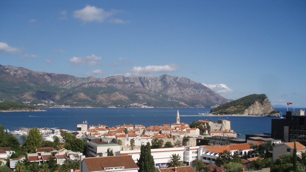 Budva, view from Gospoština.